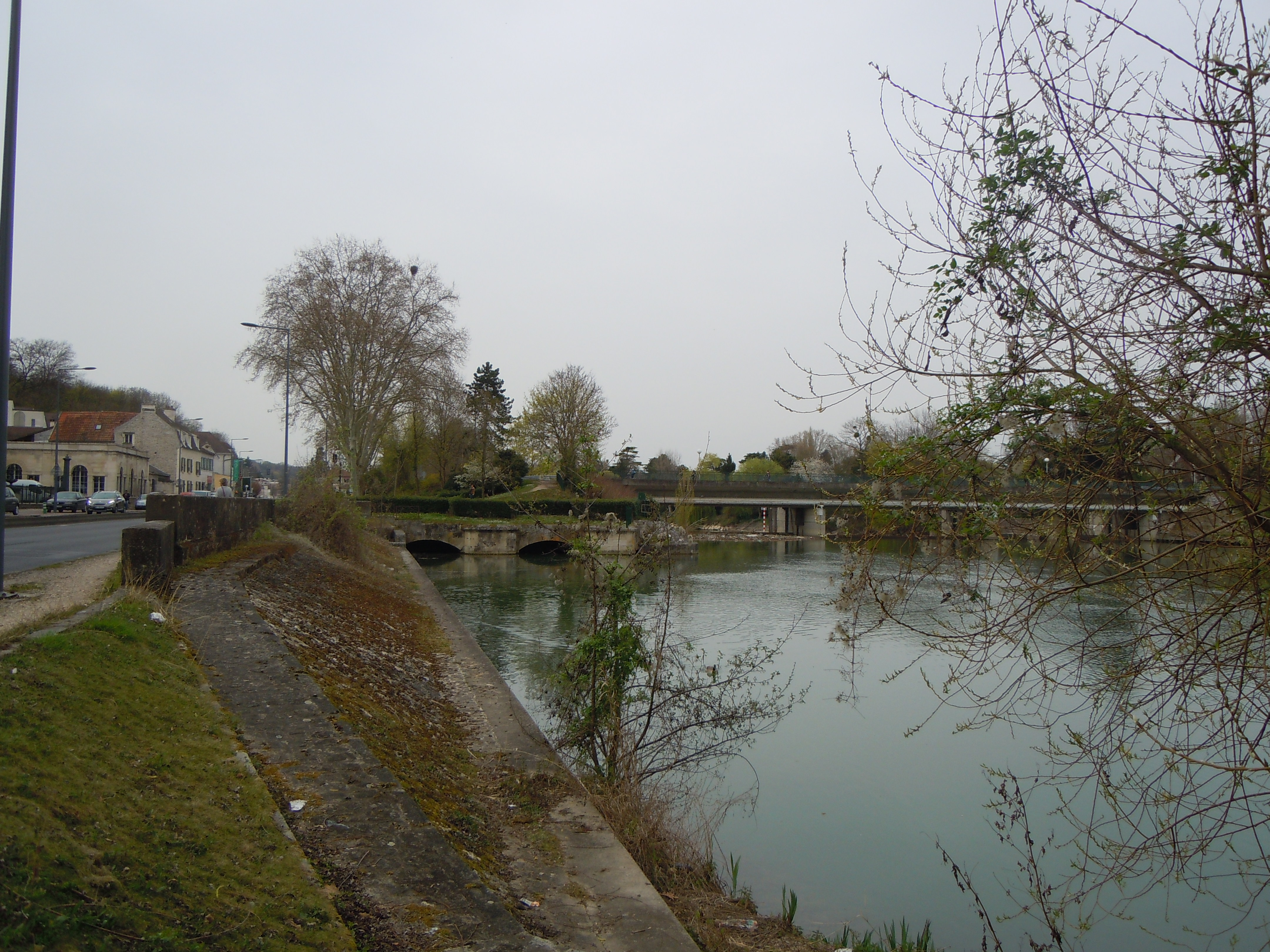 Vue actuelle du site de la Machine de Marly à l'emplacement de la peinture d'Alfred Sisley. 1873, Alfred Sisley